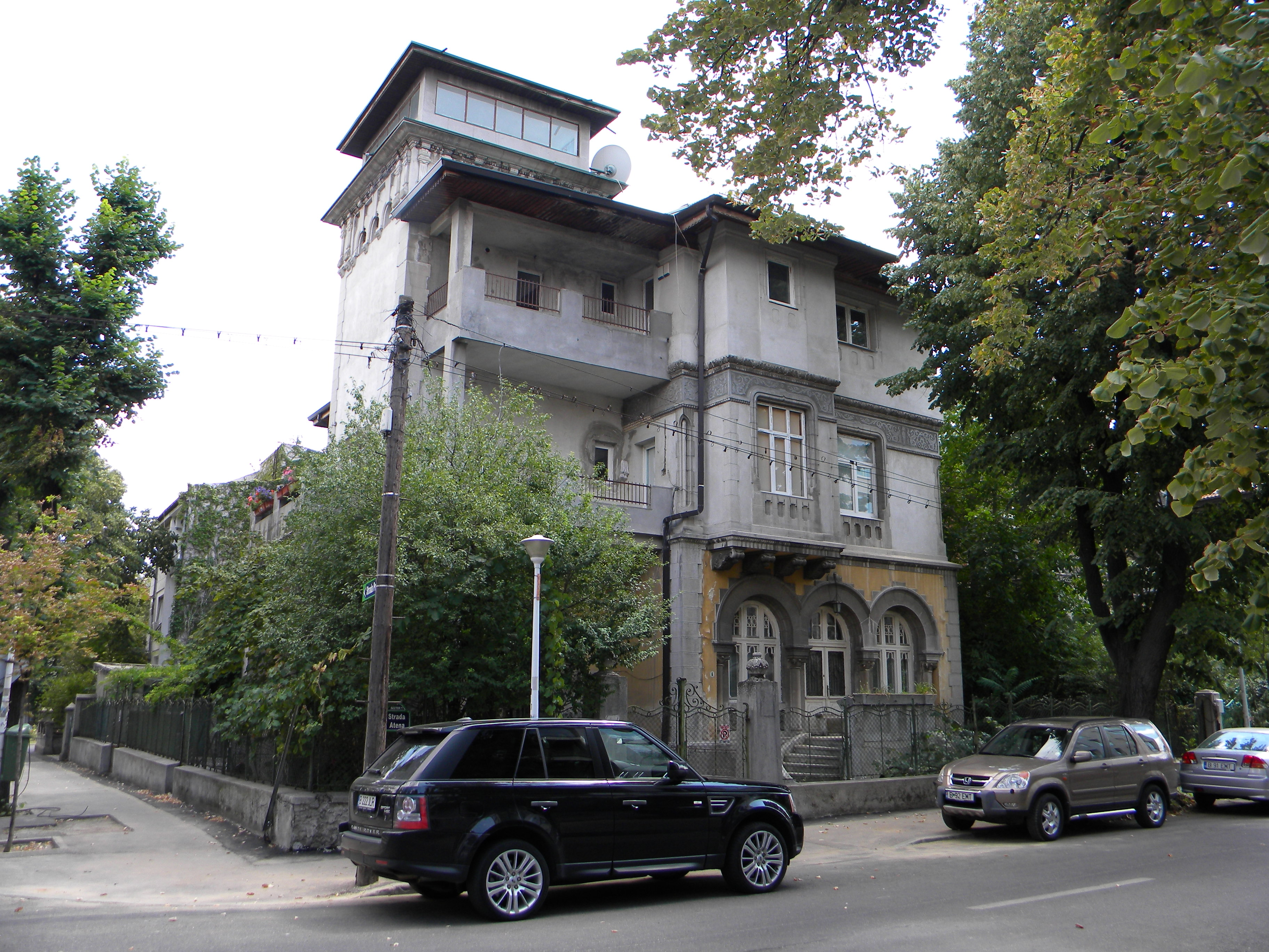 Imobil pe Str. Atena, nr. 6, Bucuresti sect. 1